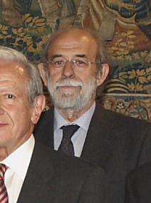 María Dolores Cospedal, presidenta de Castilla-La Mancha, recibe al Pleno del Tribunal Constitucional